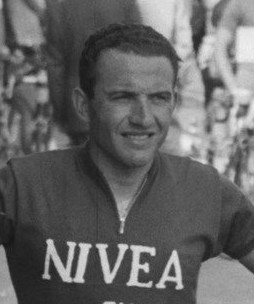 Start Ronde van Nederland Stadion Utrecht . Italiaanse ploeg (Nivea) kopman Fiorenzo Magni